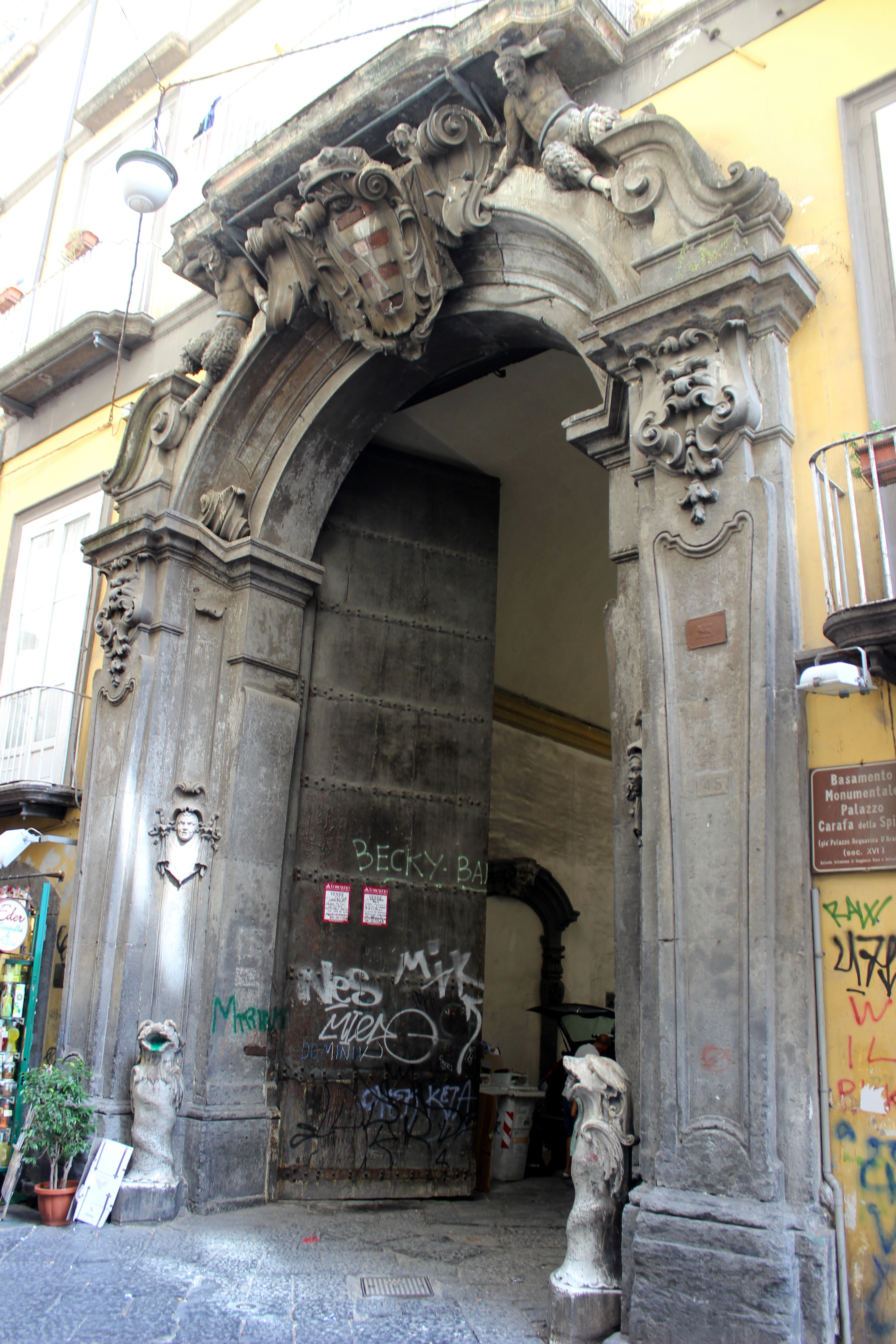 Nápoles. Palacio Carafa della Spina.